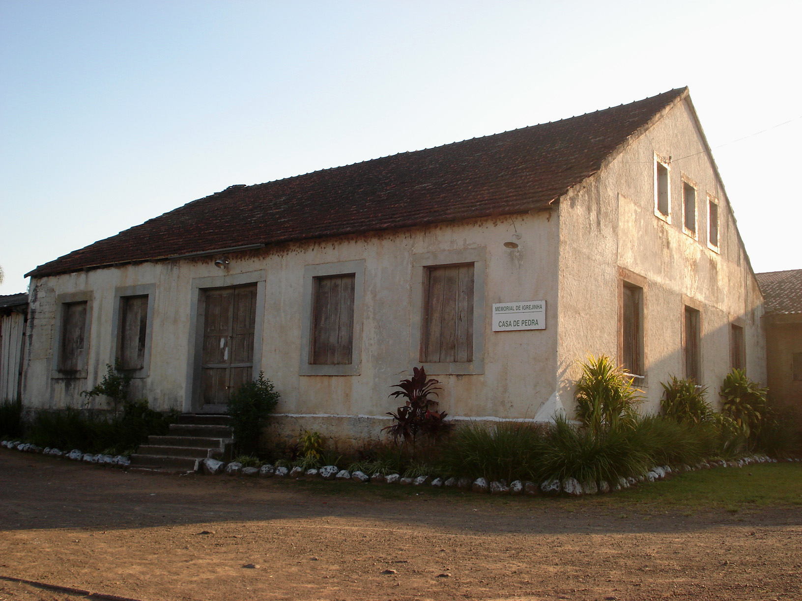 Steinhaus - Casa de Pedra em Igrejinha, Rio Grande do Sul, Brasil